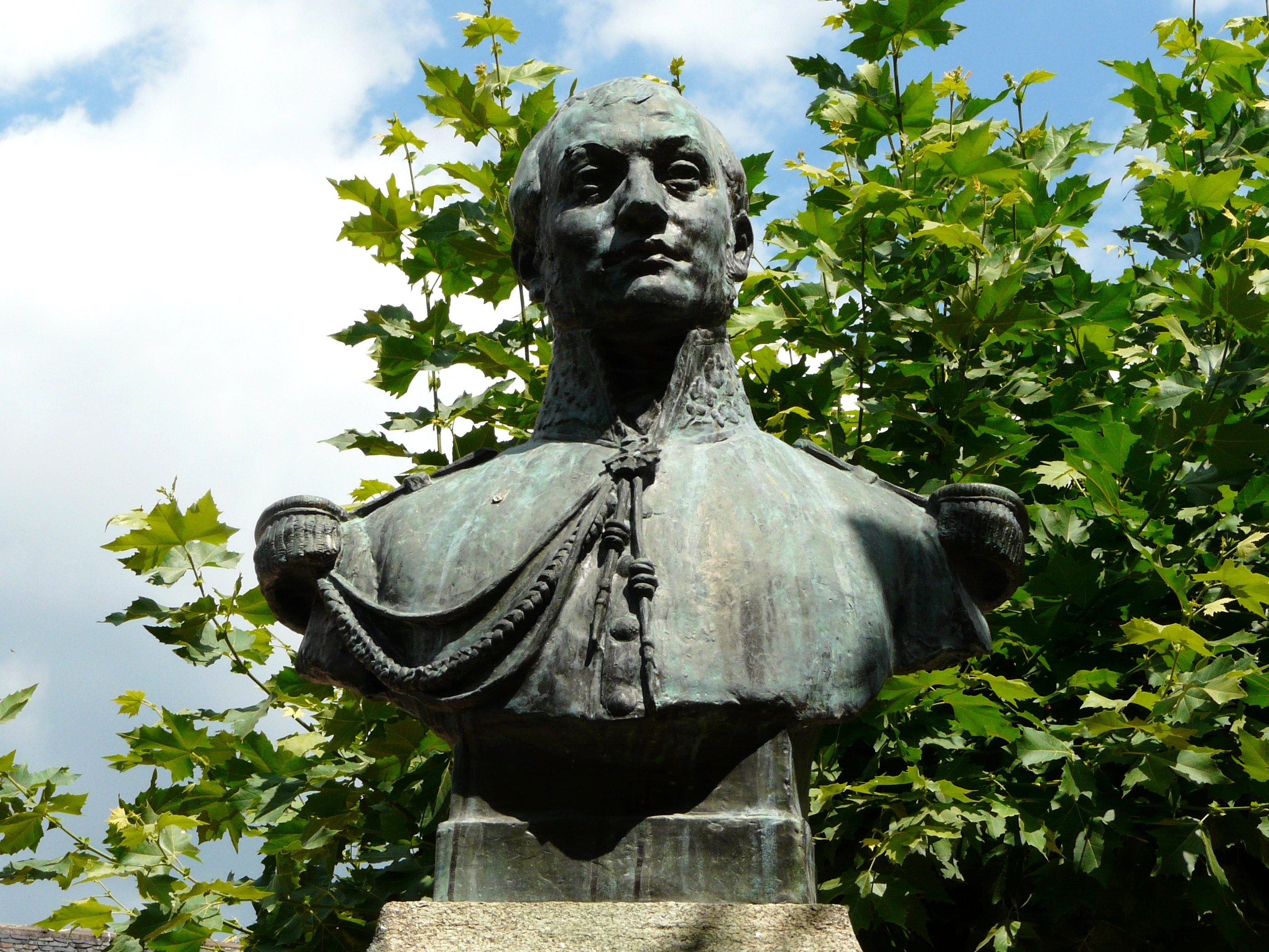 Le buste du Général Couloumy, œuvre du sculpteur Eugène Boverie (1869-1910), à Saint-Pantaléon-de-Larche, Corrèze, France.